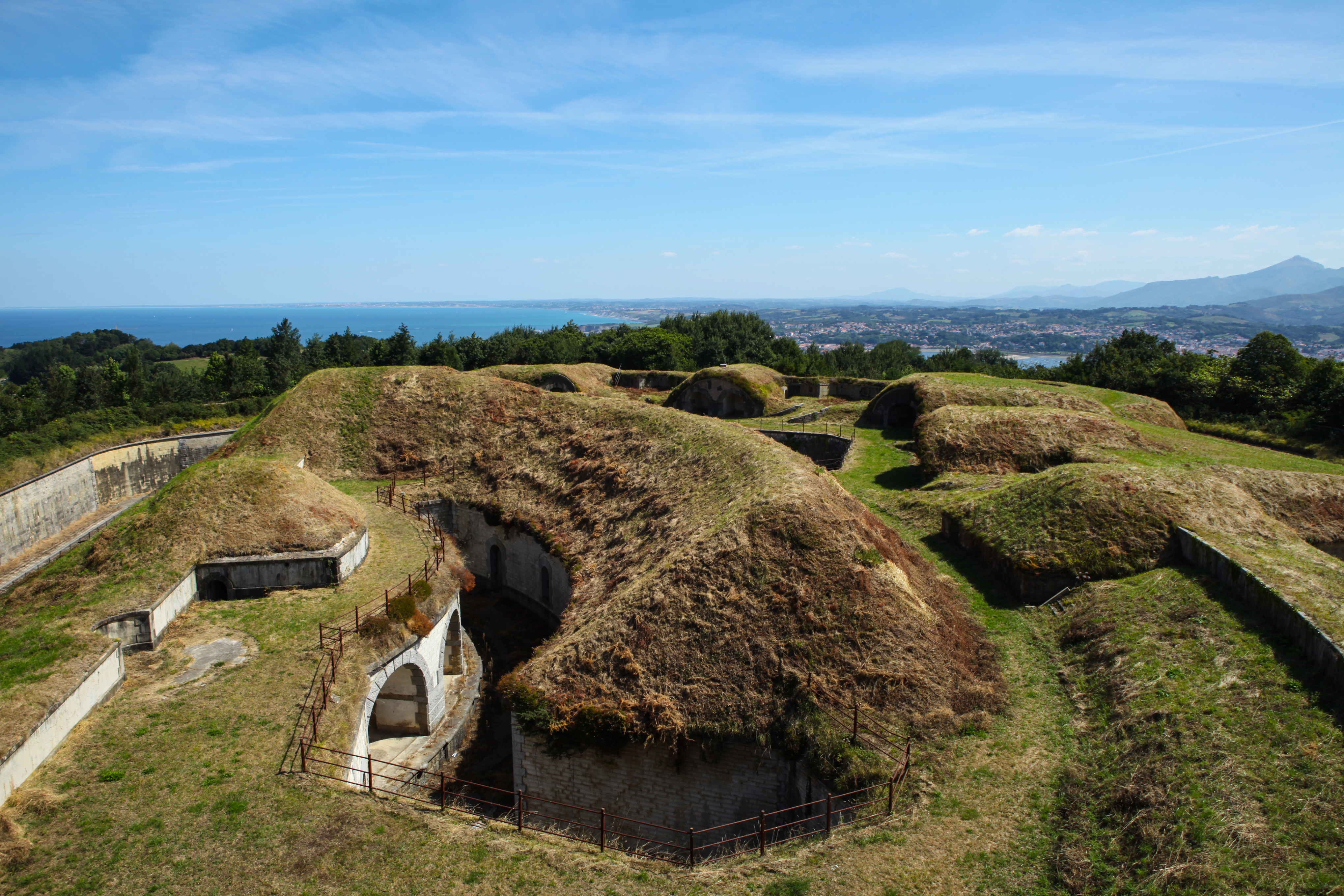 En el centro se aprecia el cuartel de artillería (de cubierta curva) y una batería de fuegos curvos. en los extremos de la fotografía: las baterías a barbeta cortadas por los traveses.